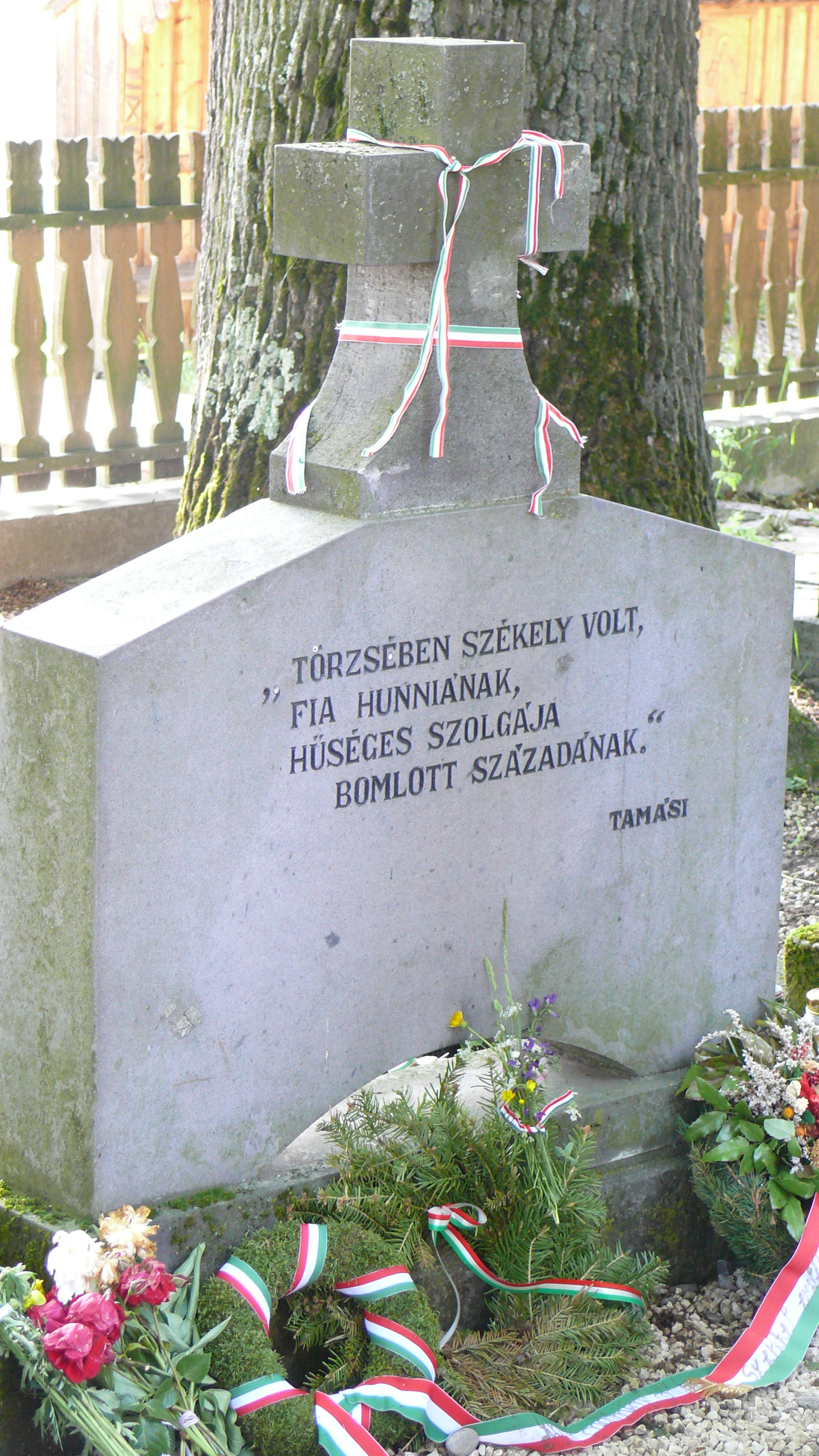 Tamási Áron síremléke Farkaslakán